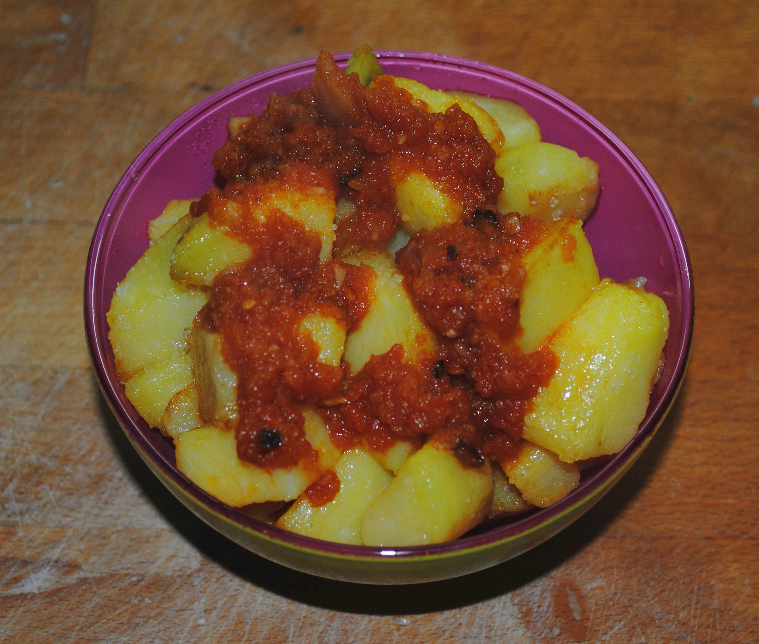 Patatas fritas con salsa brava